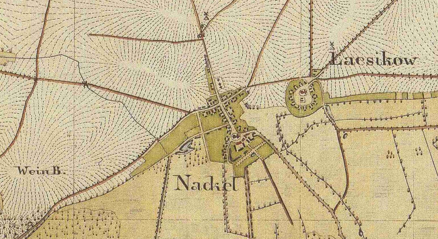 Nackel und Läsikow, Ortsteile der Gemeinde Wusterhausen/Dosse, Lkr. Ostprignitz-Ruppin, Brandenburg